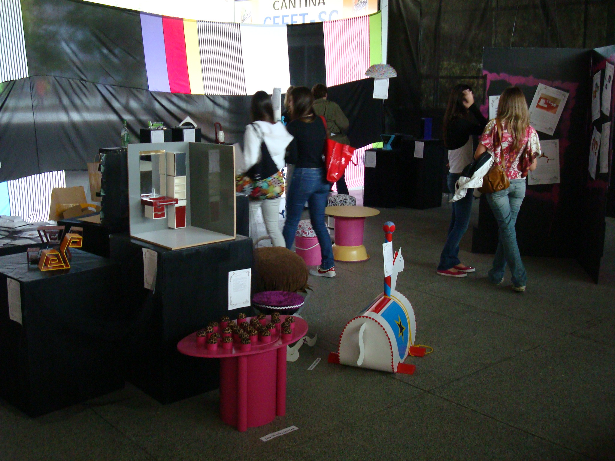 Trabalhos dos alunos do curso superior de tecnologia em Design de Produto da Unidade Florianópolis do CEFET-SC expostos na 11ª edição da Mostra Design, evento realizado semestralmente no CEFET-SC